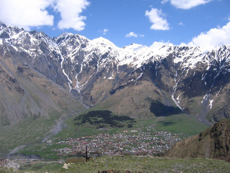 Näkymä Stepantsmindan kaupunkiin. Qazbegin piirikunta